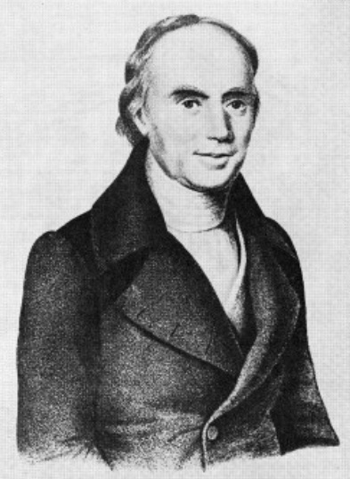 August Pichler, Schauspieler und Theaterdirektor